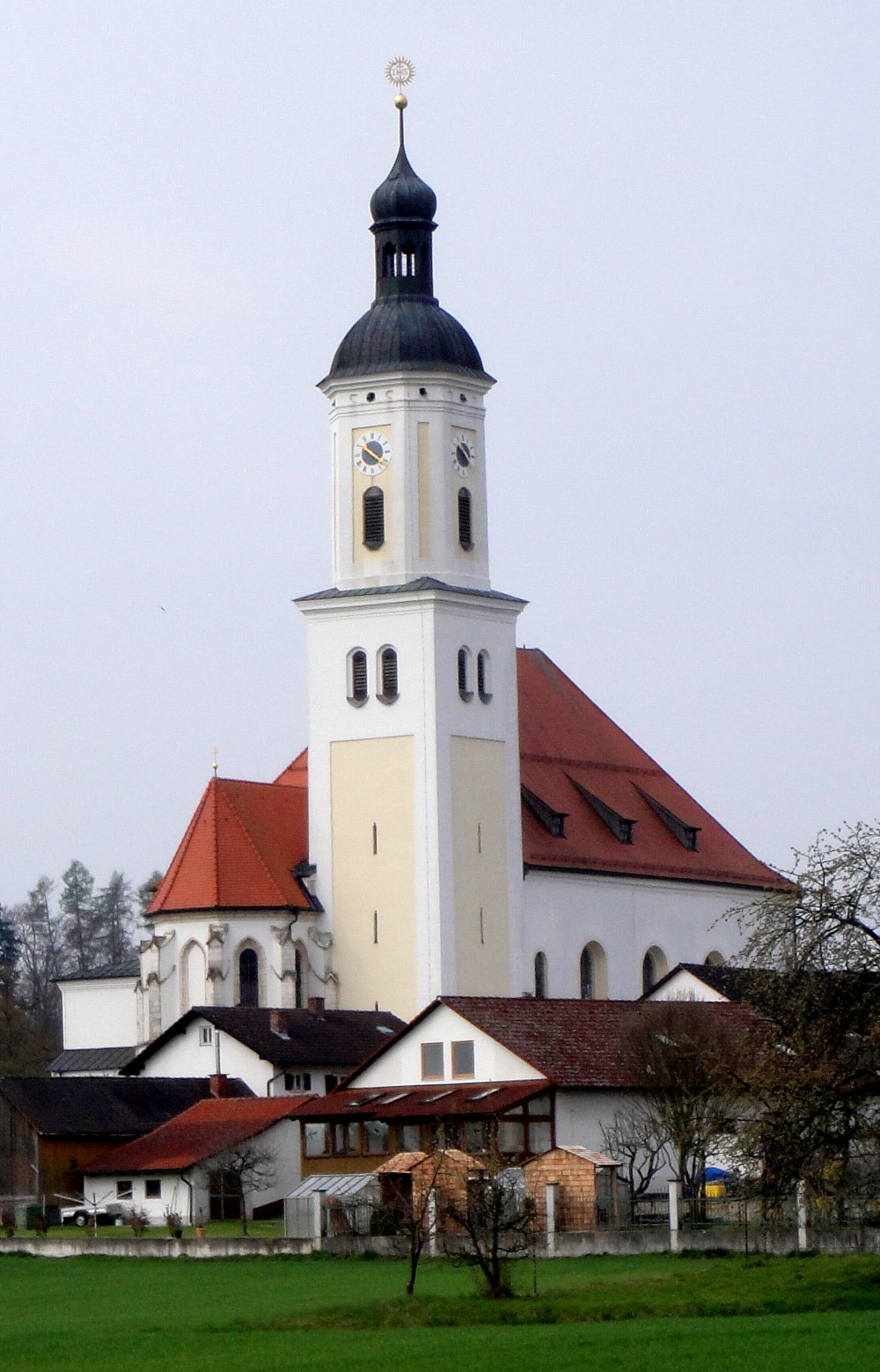 Blick aus nordöstlicher Richtung auf die Wallfahrtskirche St. Salvator in Bettbrunn (bei Kösching).